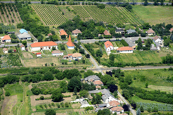 Légi fotó Szegi